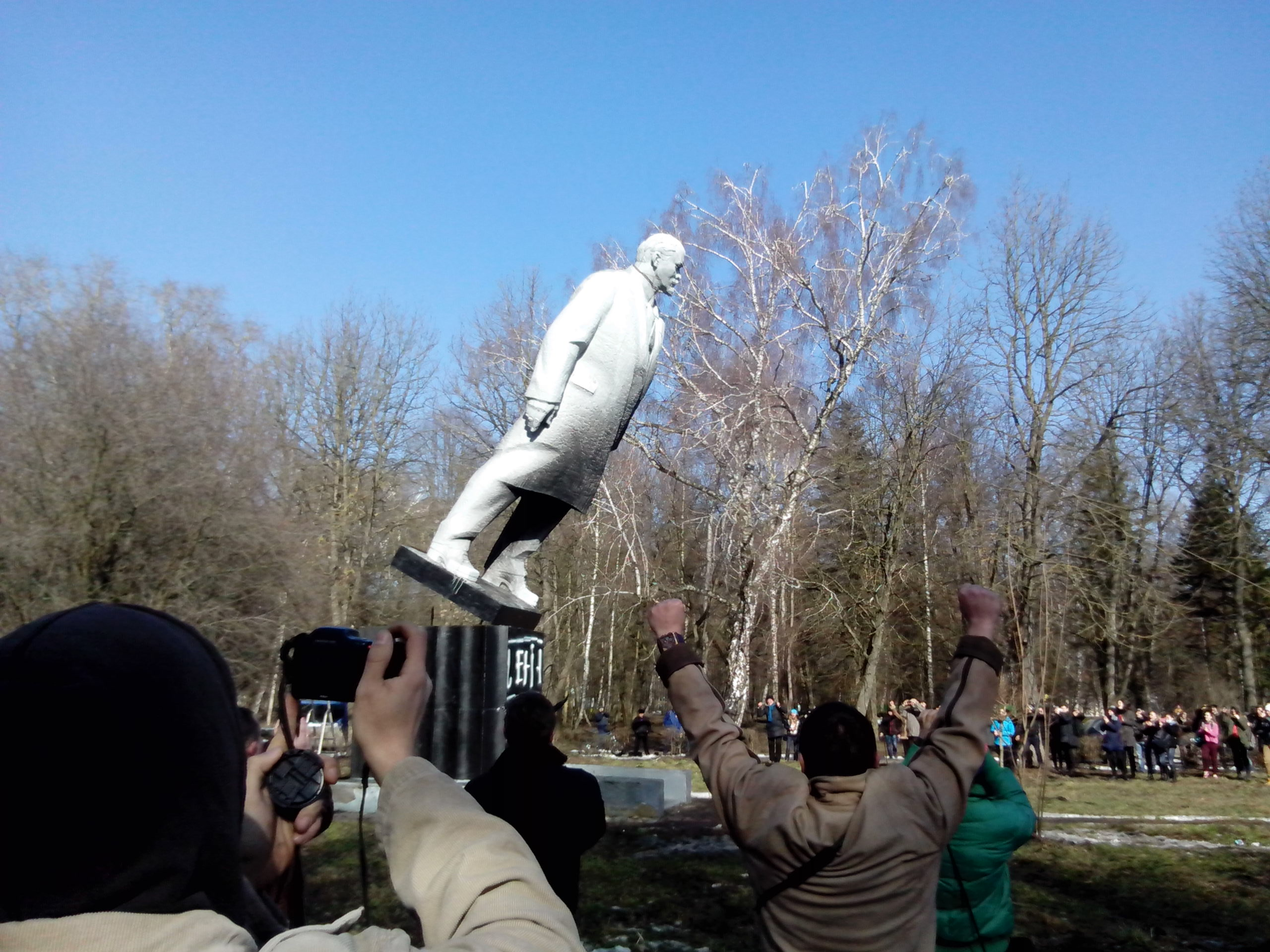 Пам'ятник Леніну в момент падіння. Хмельницький, парк культури і відпочинку імені Чекмана.